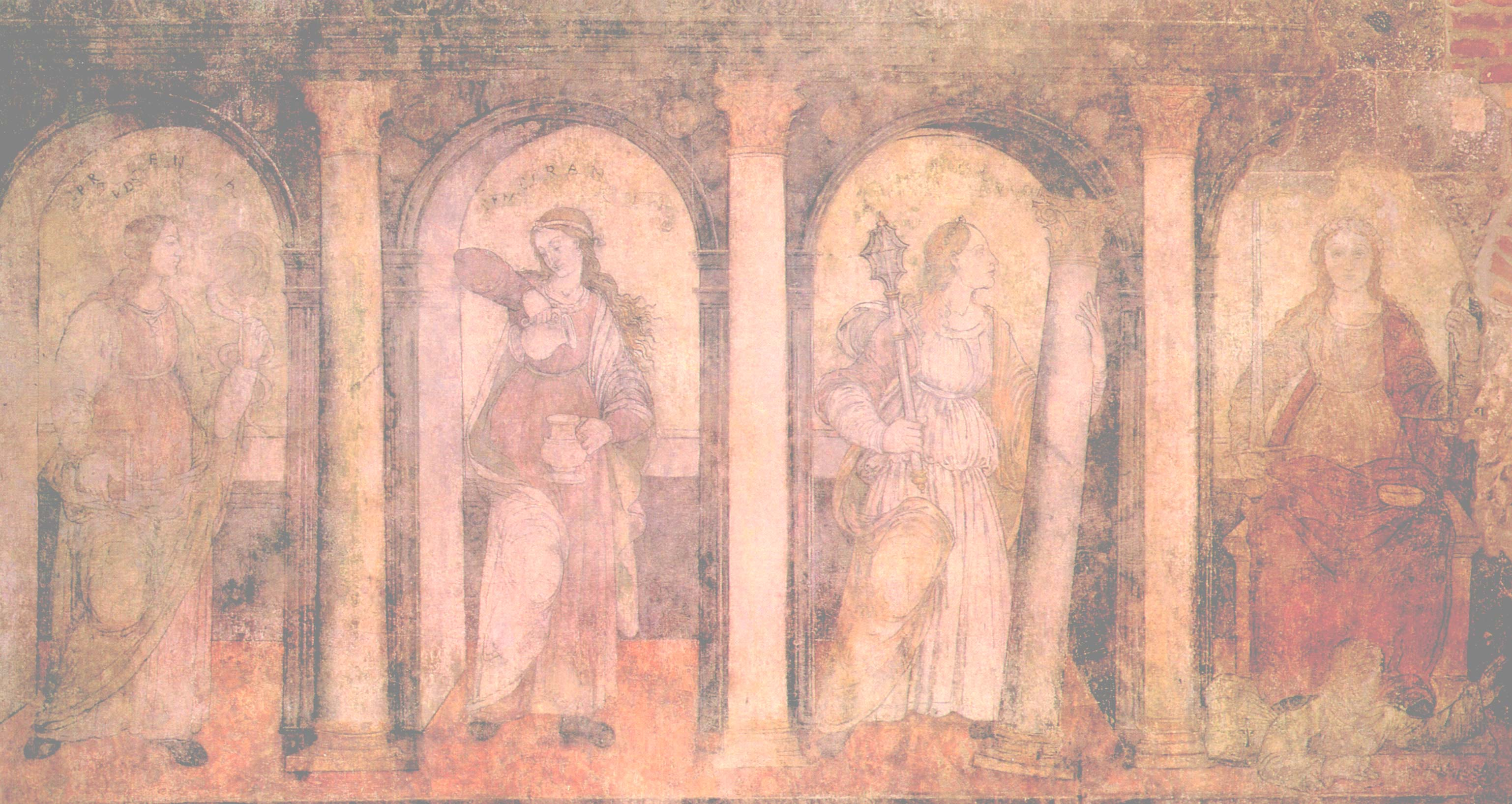 A sarkalatos erények freskósora Esztergomban, Vitéz János érsek studiolójában. Prudentia (Bölcsesség) alakja, akinek könyv és kígyó van a kezében. A második Temperantia (Mértékletesség), egy korsóból vizet tölt a másikba. A harmadik erény Fortitudo (Erő), erejét egy óriási márványoszlop szimbolizálja, amit könnyedén megtart. Végül a negyedik erény Iustitia (Igazság) kardot és mérleget tart a a két kezében. A freskó mérete 4×5 méter.